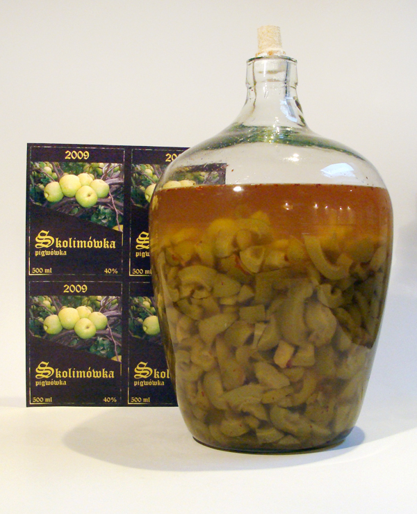 Pigwówka w trakcie maceracji (2009)